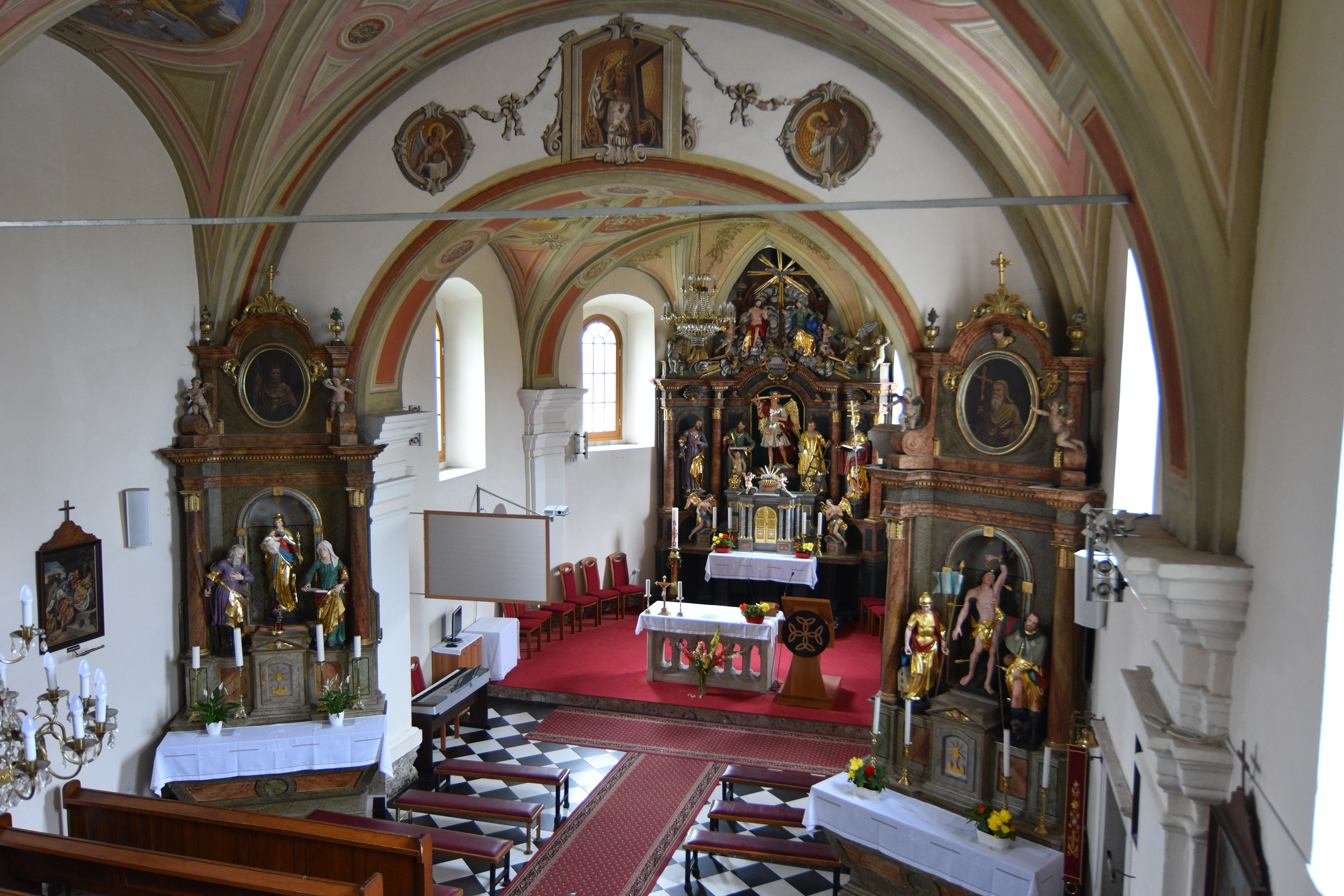 Župnijska cerkev sv. Mihaela , Parish church Saint Michael (Veržej) Interior